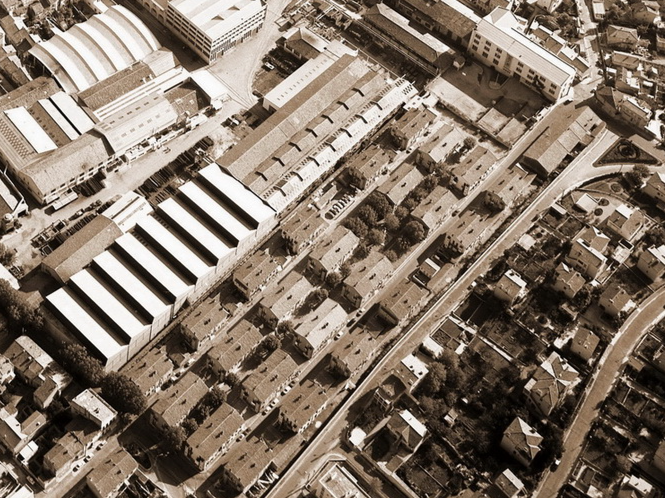 Photo de la cité ouvrière accolée au chantier naval